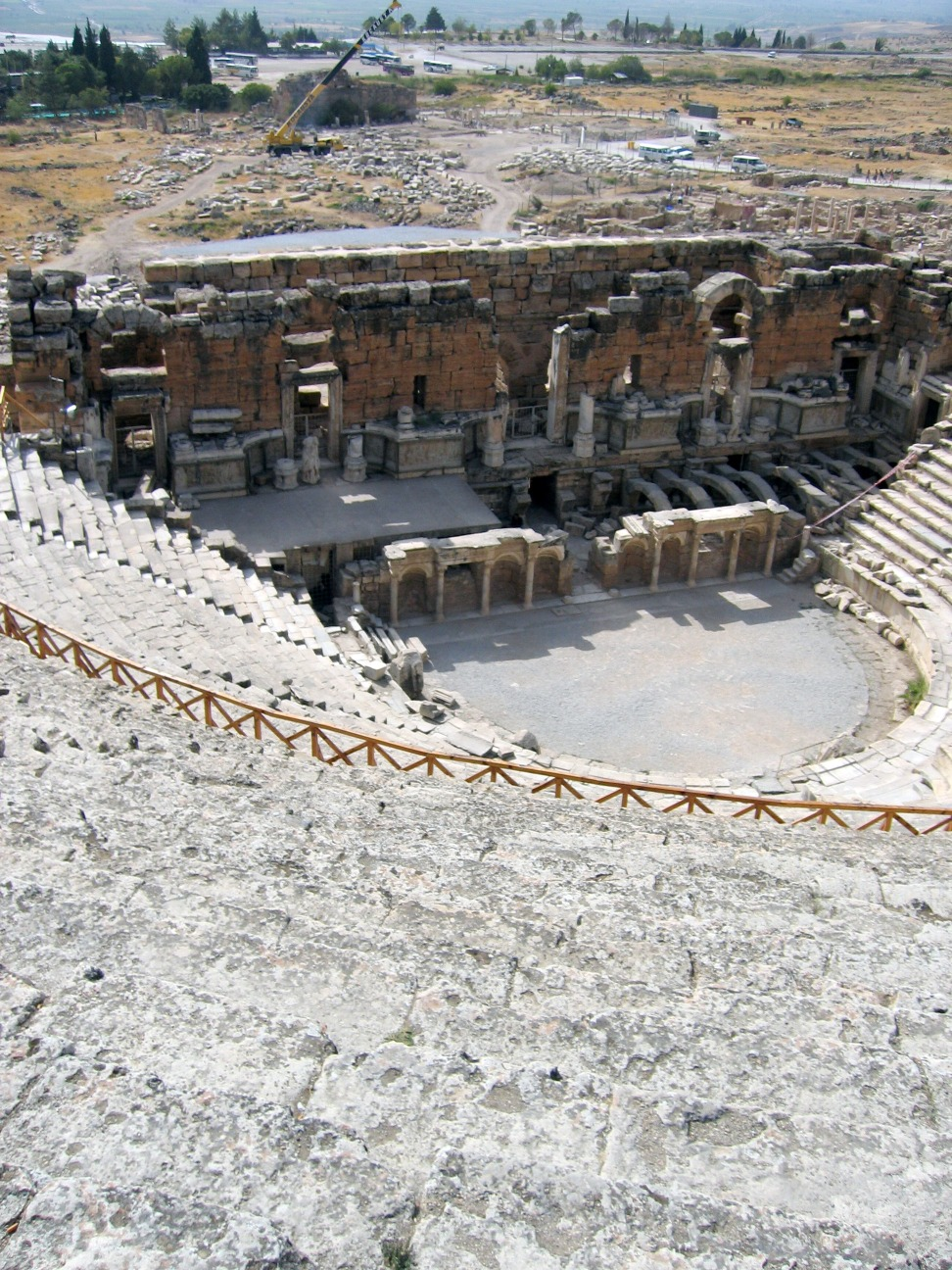 Hierapolis Theater